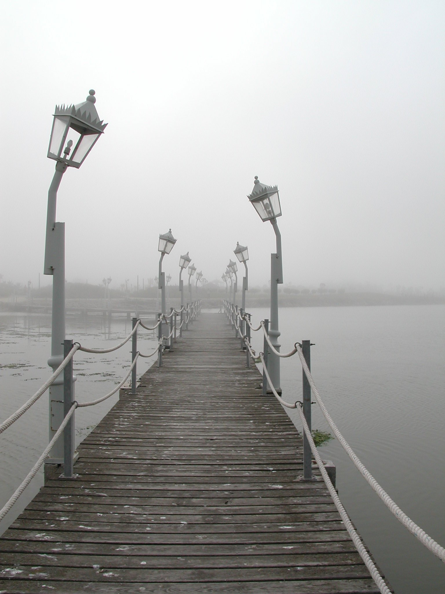 Entrée du musée Dubout à Palavas-les-Flots (Hérault) (France)